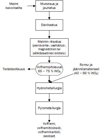 Yksinkertaistettu malli volframin tuotantoprosessi malmista metalliksi ja seoksiksi. Kuvassa on esitetty prosessin oleellisimmat vaiheet.